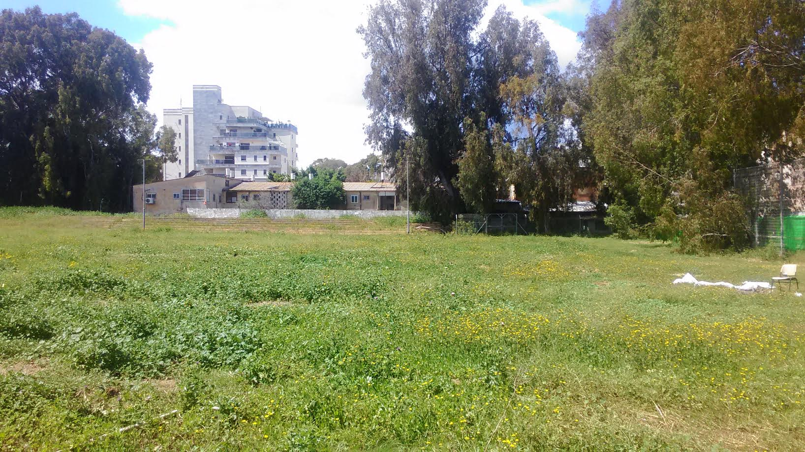 חורבות מגרש הכדורגל של מכבי חדרה